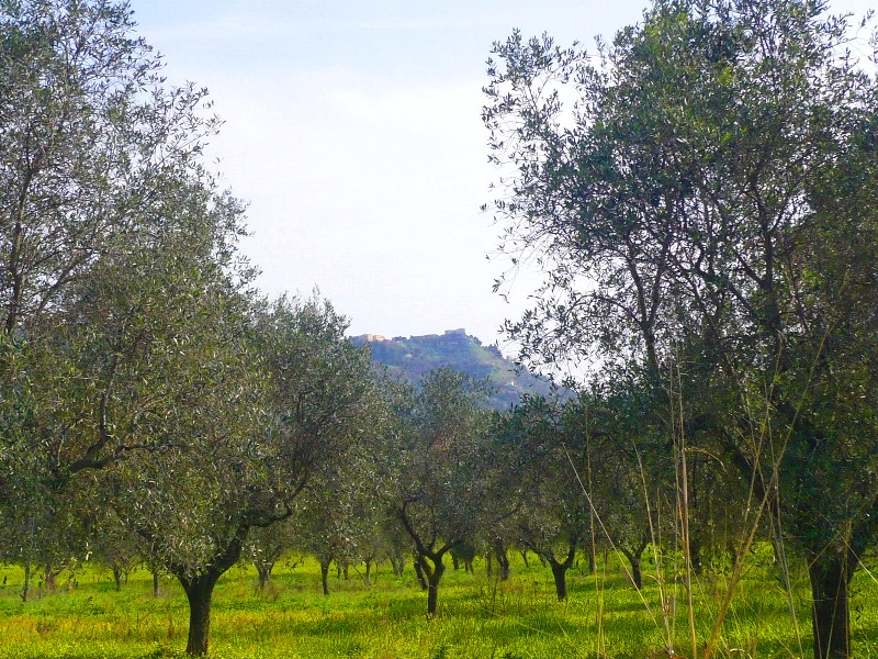 piante di ulivo a alano di castellabate (salerno)